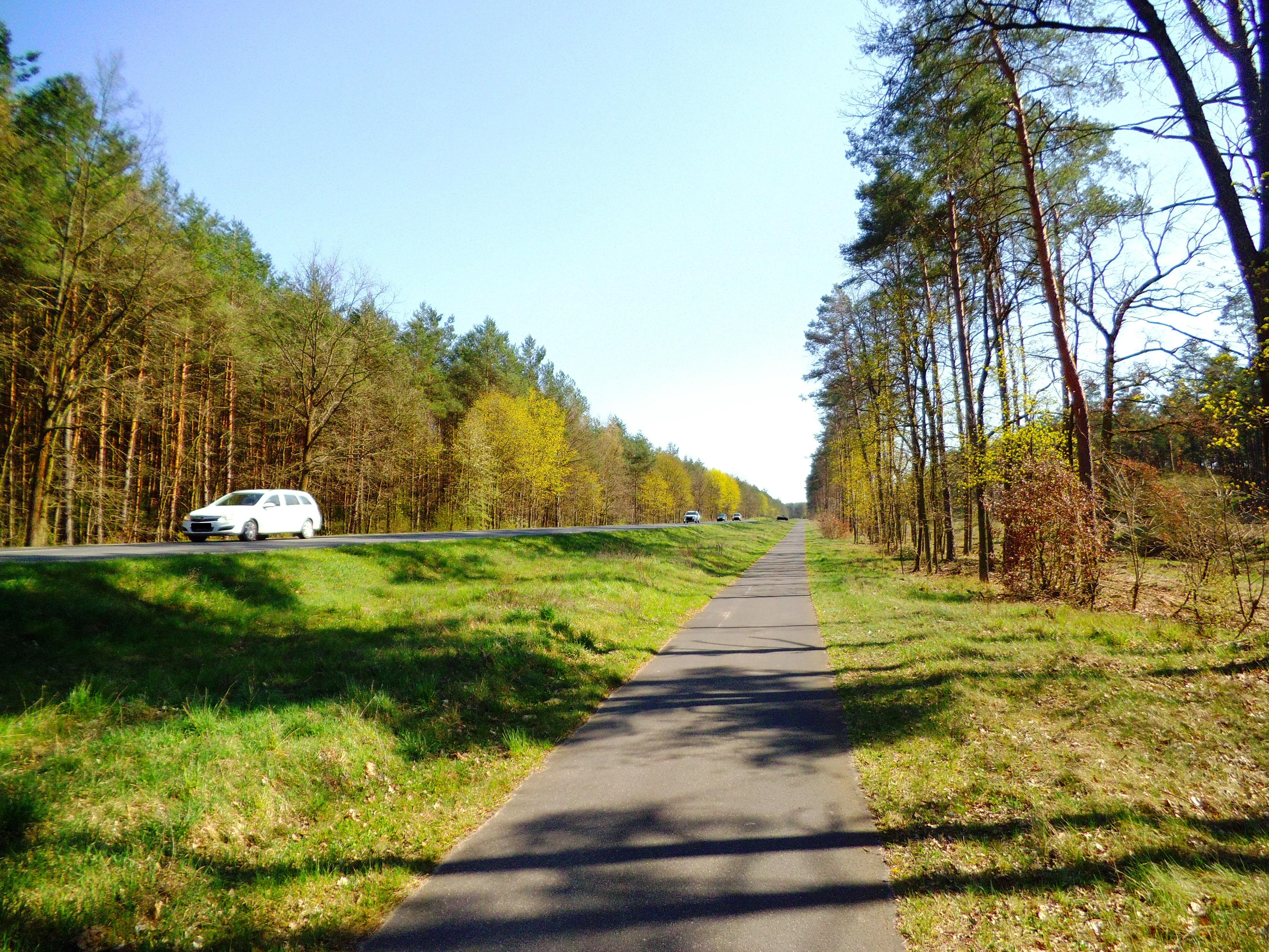 Droga rowerowa z Torunia do Unisławia